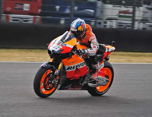 Dani Pedrosa sur la RC213V au GP du Mugello 2012